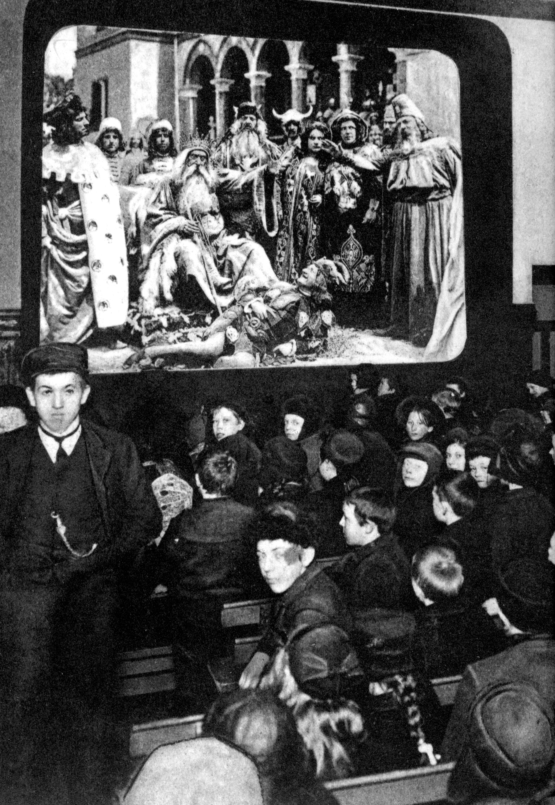 Fram Kino 1911 kinofremvisning